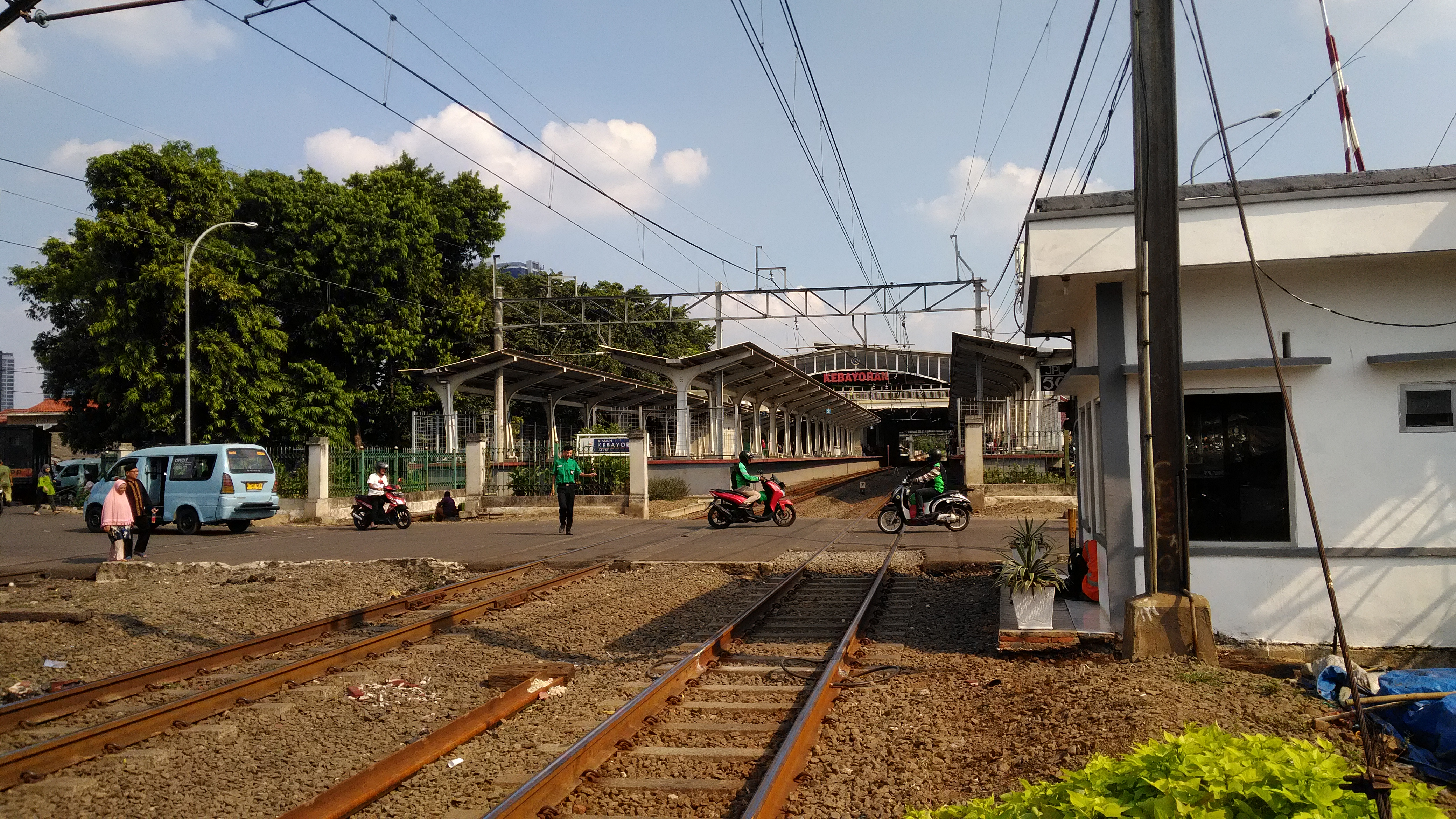 Stasiun Kebayoran, 2019